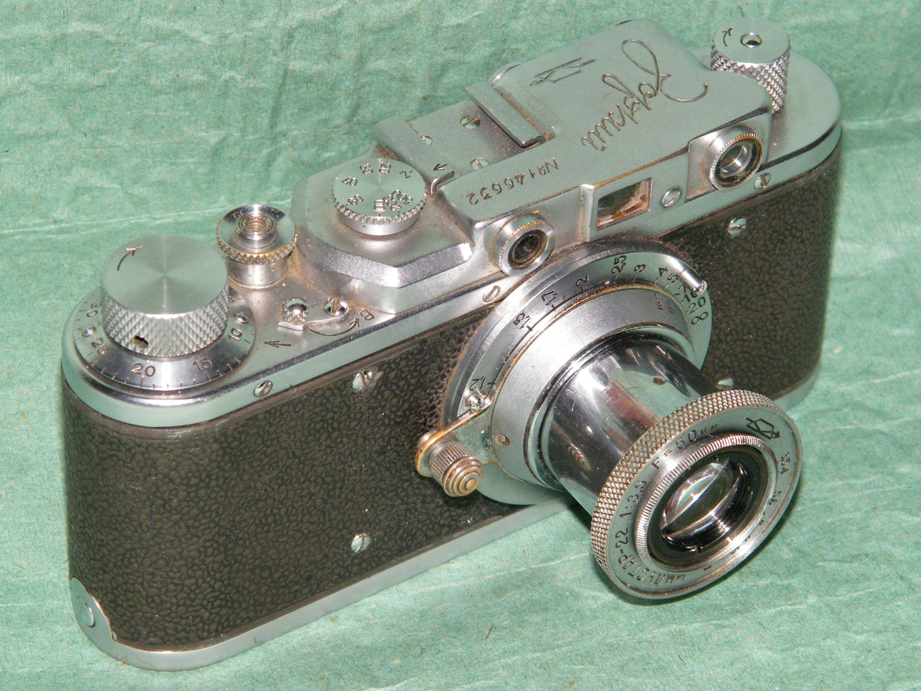 Фотоаппарат ЗОРКИЙ (1953)